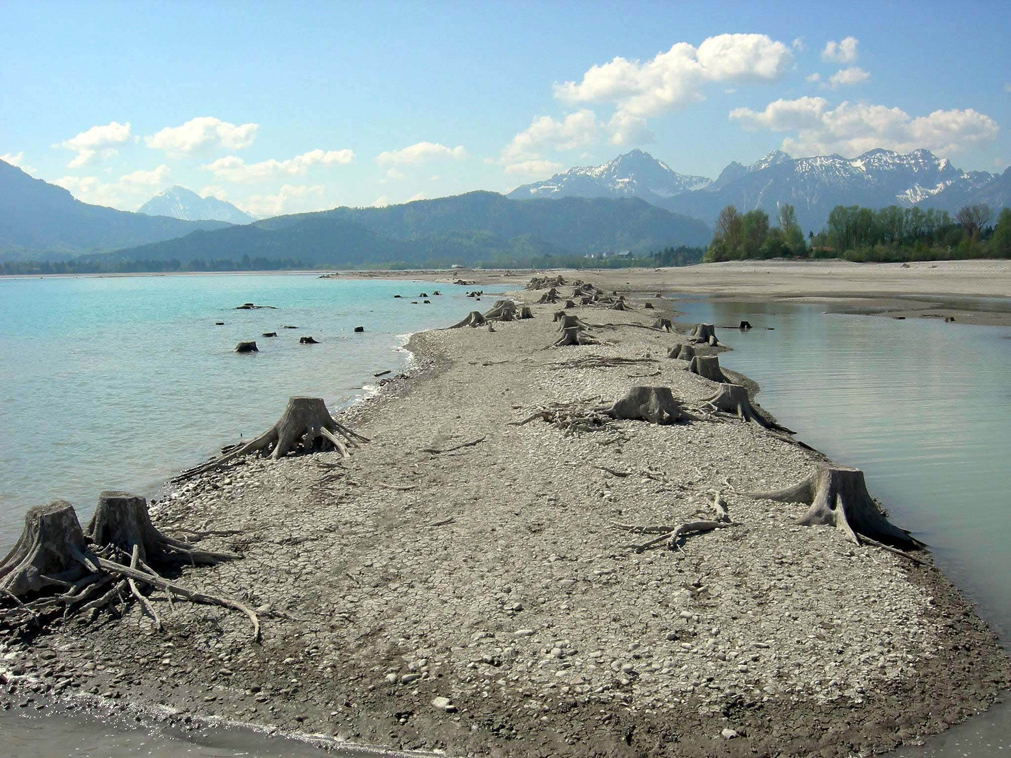 Der Damm der Via Claudia Augusta ist während des Forggensee-Aufstauens im Frühjahr für kurze Zeit gerade noch sichtbar. Im Hintergrund rechts die Tannheimer Berge.